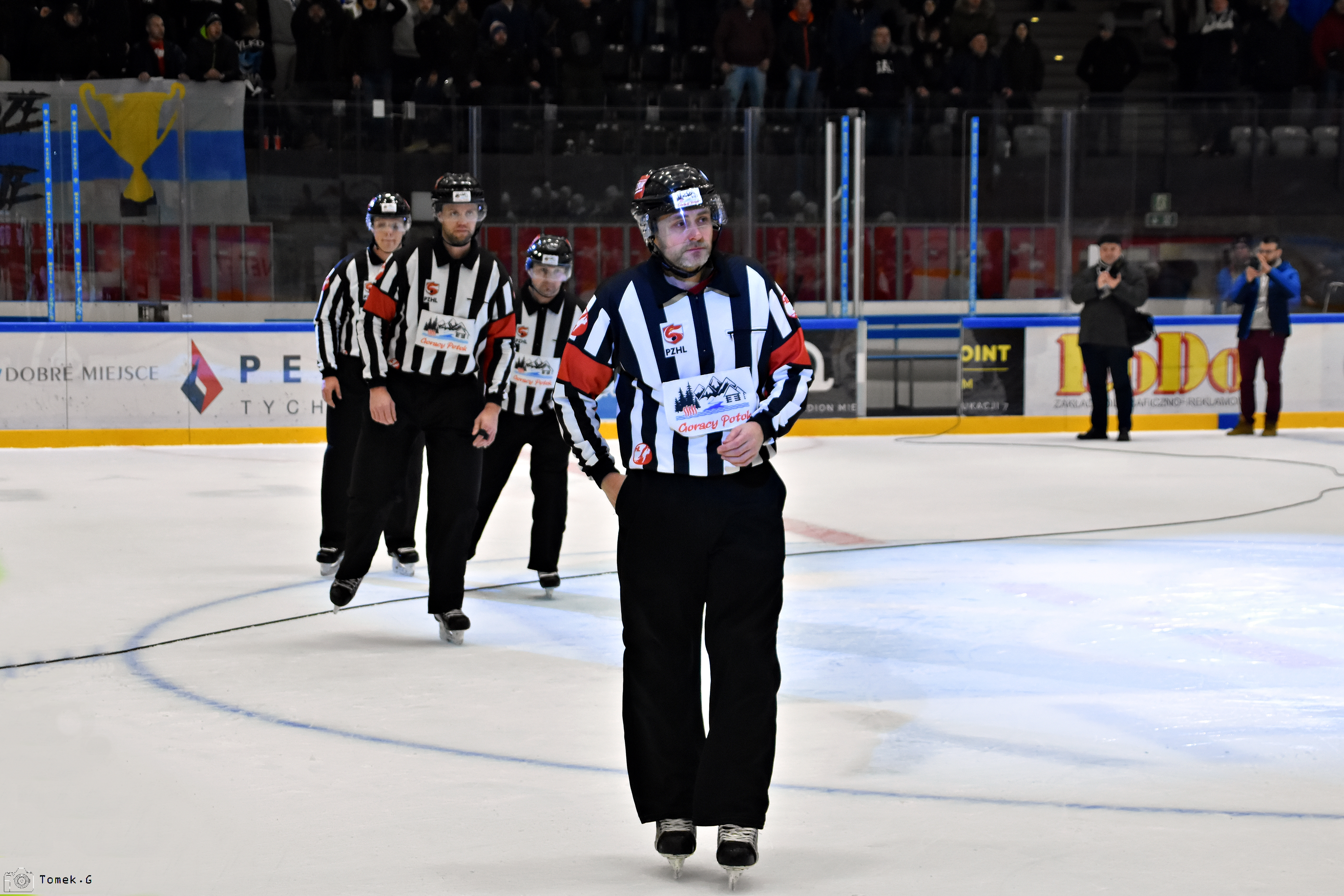 Sędziowie główni: Olov Lundqvist, Paweł Meszyński Sędziowie liniowi: Ľudovít Šoltés, Sławomir Szachniewicz